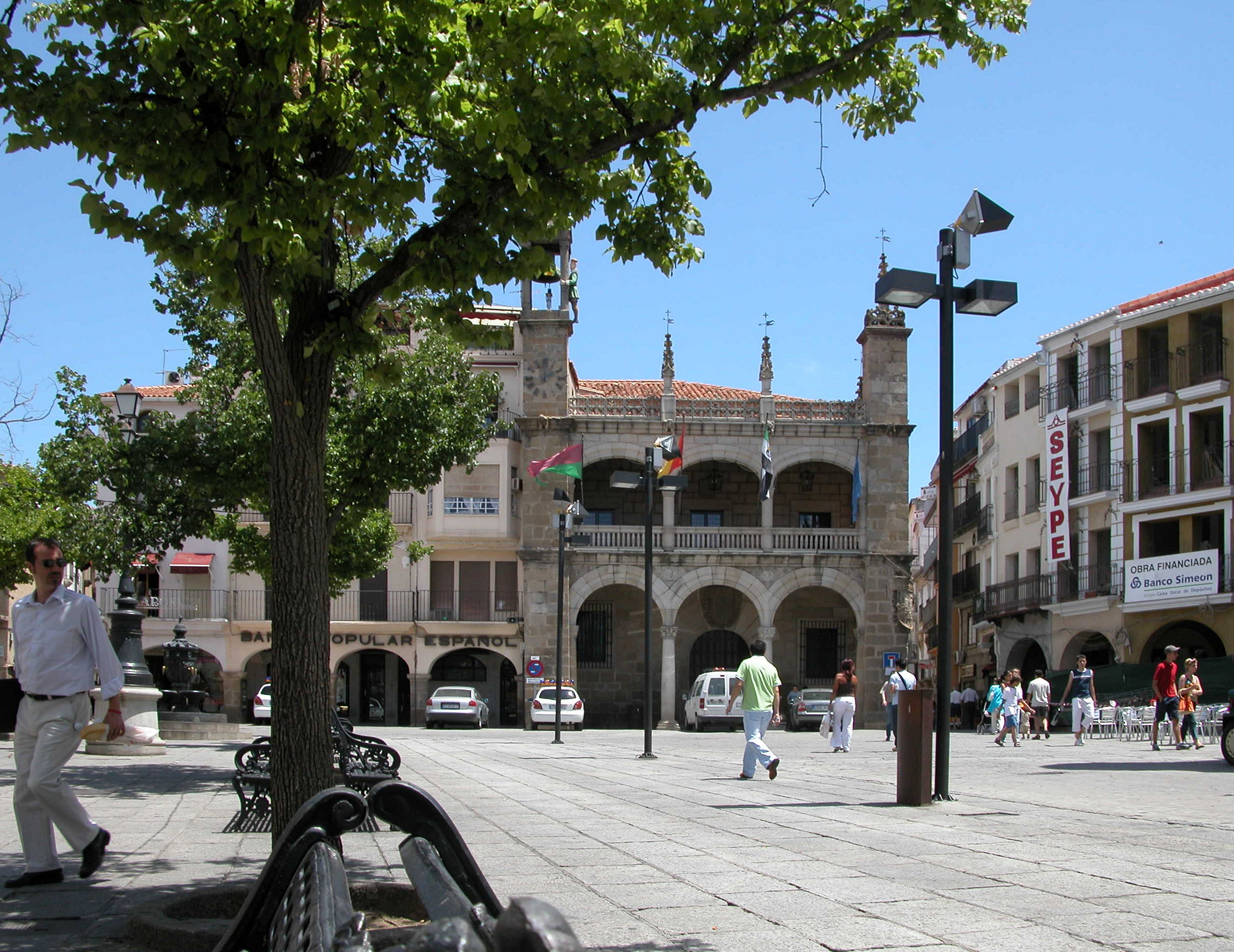 Fachada del Ayuntamiento de Plasencia